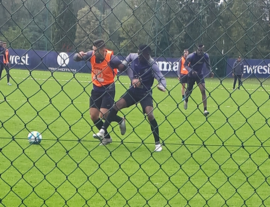 Kouloúris durant une session d'entraînement avec le Toulouse FC le mercredi 6 novembre 2019.